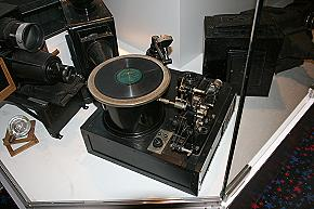 Schellackplatten Tonanlage fuer Kinos etwa 1920 im Film- und Kinomuseum Baden-Württemberg in Biberach an der Riß